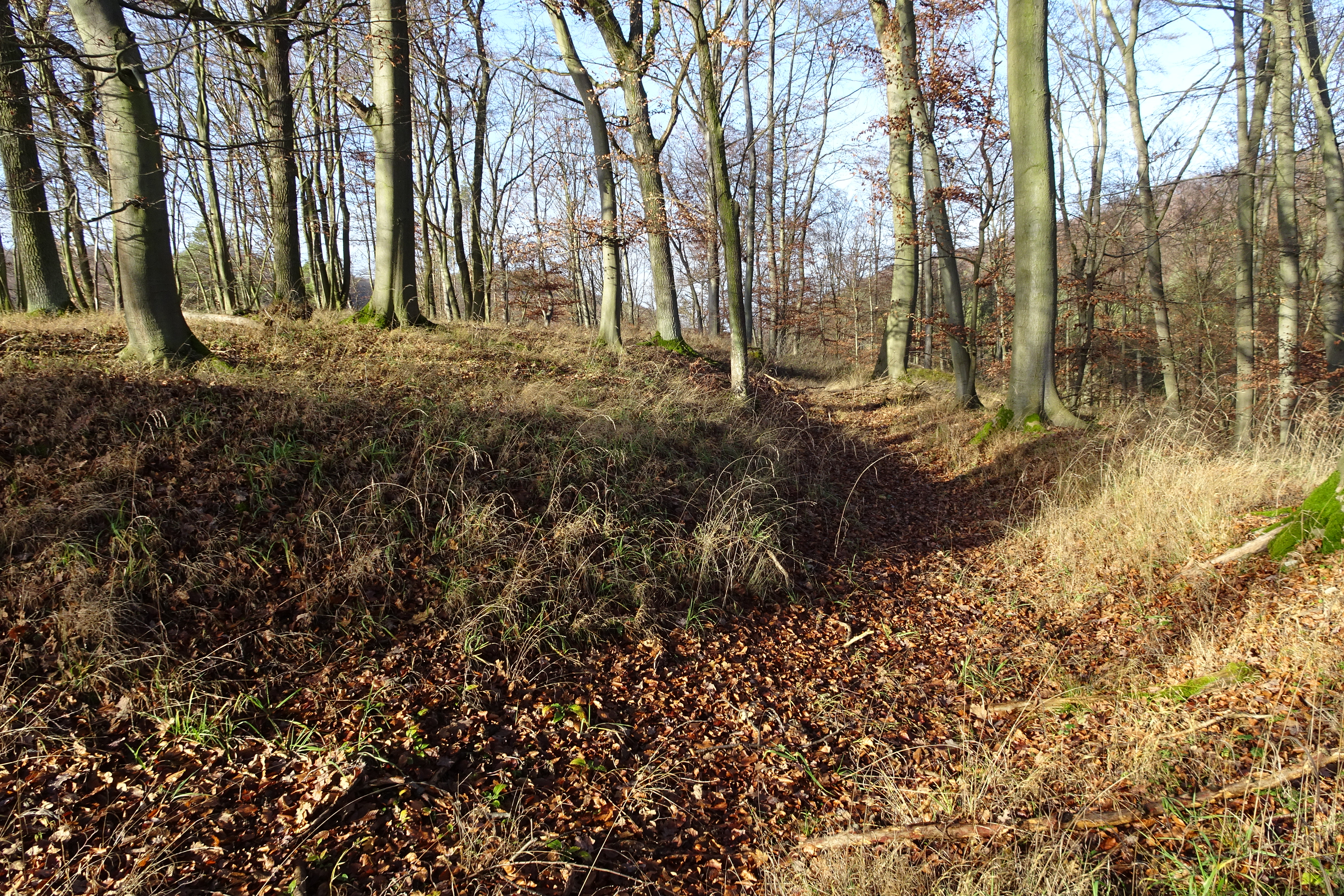 Der „Taubenberg“ liegt mit einer Höhe von 340 m im mittleren Ulfetal, in der Gemarkung von Breitau, einem Ortsteil Sontras, im nordhessischen Werra-Meißner-Kreis. Auf seiner Kuppe finden sich Überreste einer langgestreckten, rechteckigen Burganlage, von der heute nur noch verflachte Wälle und Gräben erhalten sind. Die dort geborgenen Keramikscherben werden in das 12. und 13. Jahrhundert datiert. Über die Erbauer und die Entstehungszeit ist nichts bekannt, es fehlen jegliche zeitgenössischen Zeugnisse.